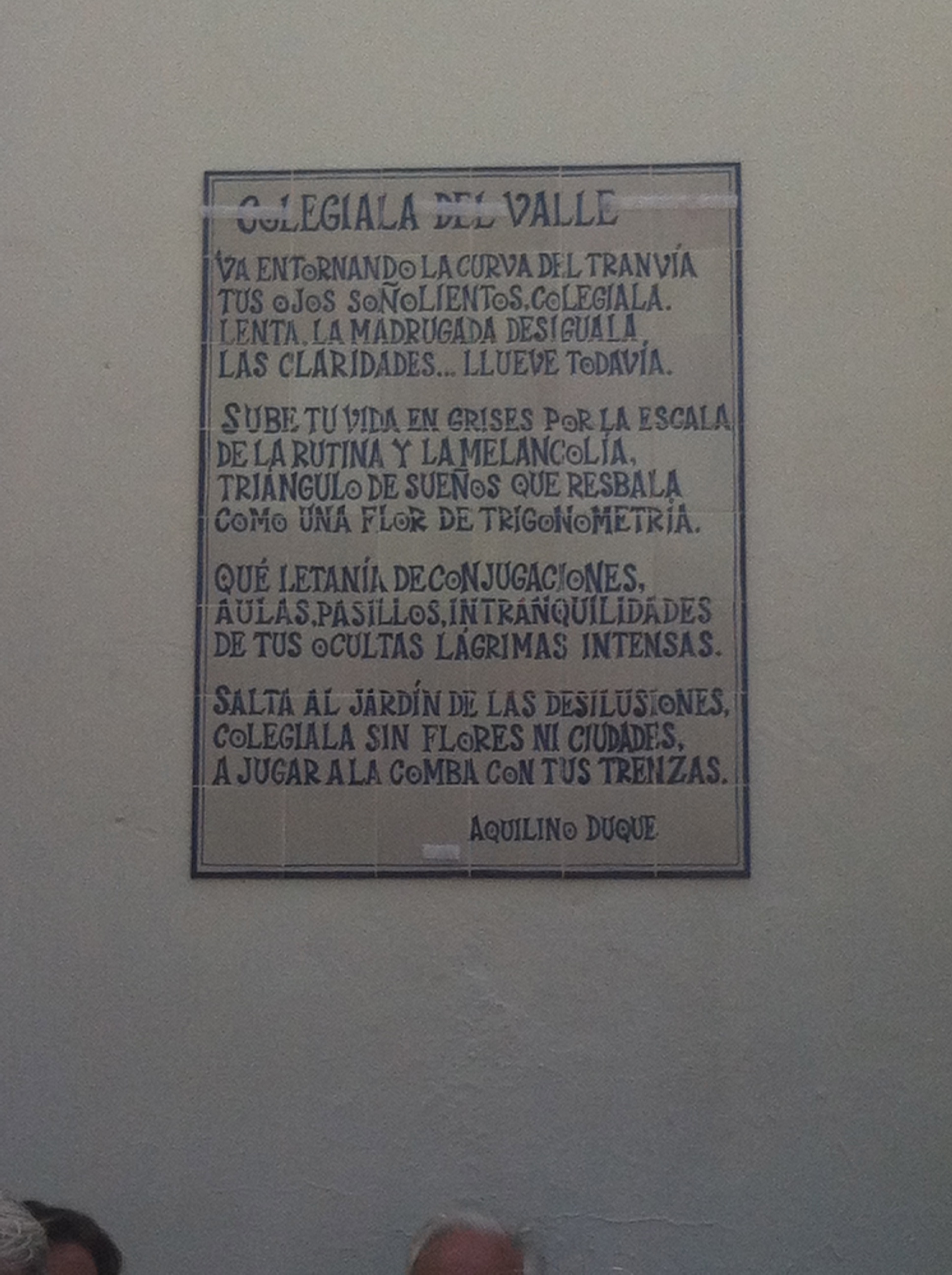 Azulejo colocado en los jardines del Valle de Sevilla el 10 de mayo de 2013